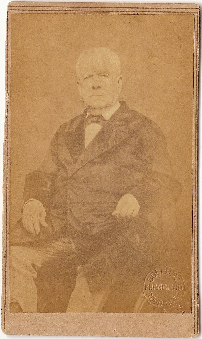 José Inácio de Abreu e Lima, General do Exército, Historiador. (Col. Francisco Rodrigues; FR-2666)